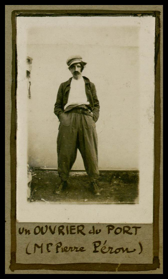 Photo de Pierre Péron, acteur du 4e acte de l'opérette "Oh Ys" de Maurice Marchand